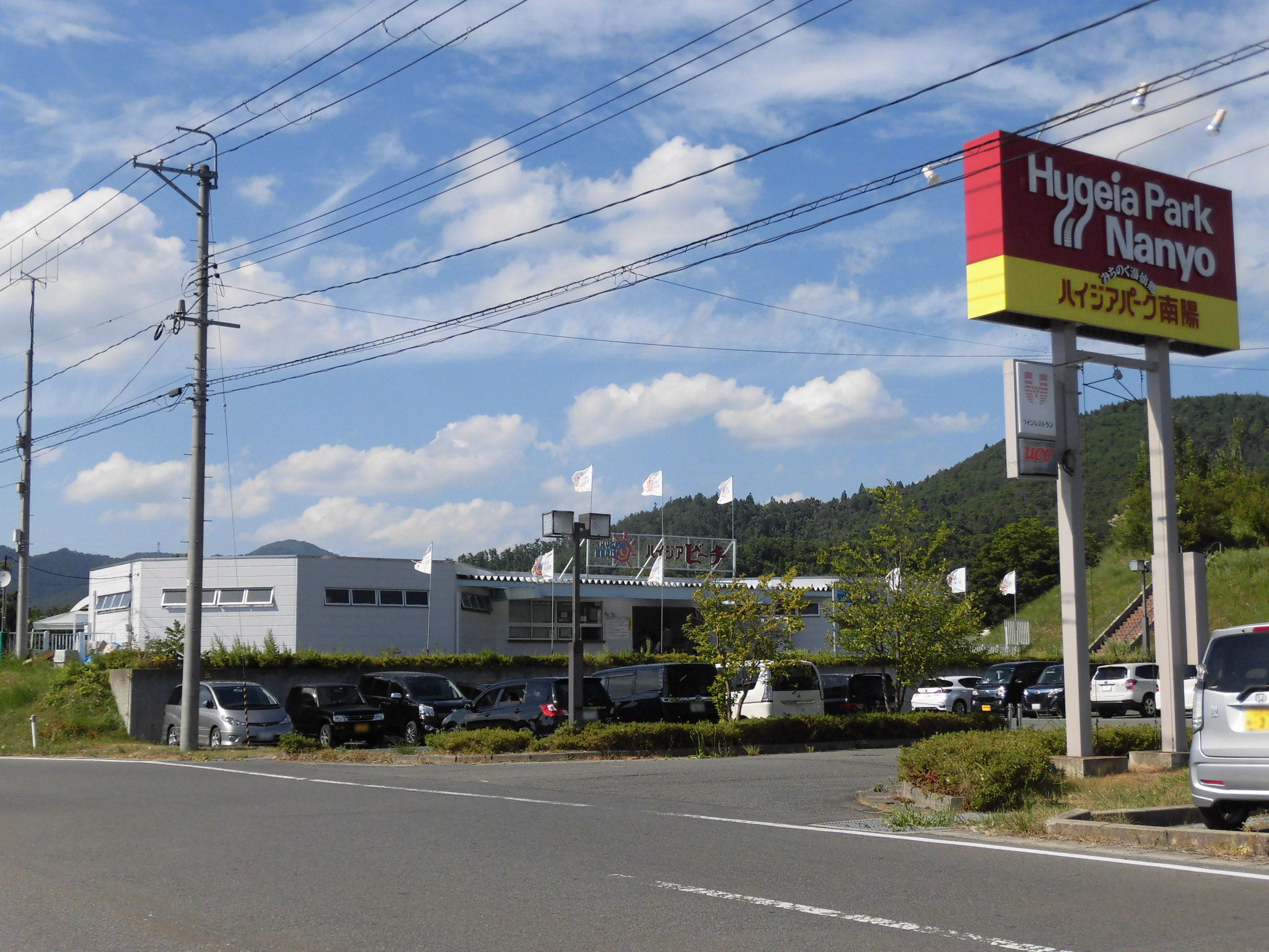 ハイジアパーク南陽。山形県南陽市上野に所在。温泉レジャー施設。